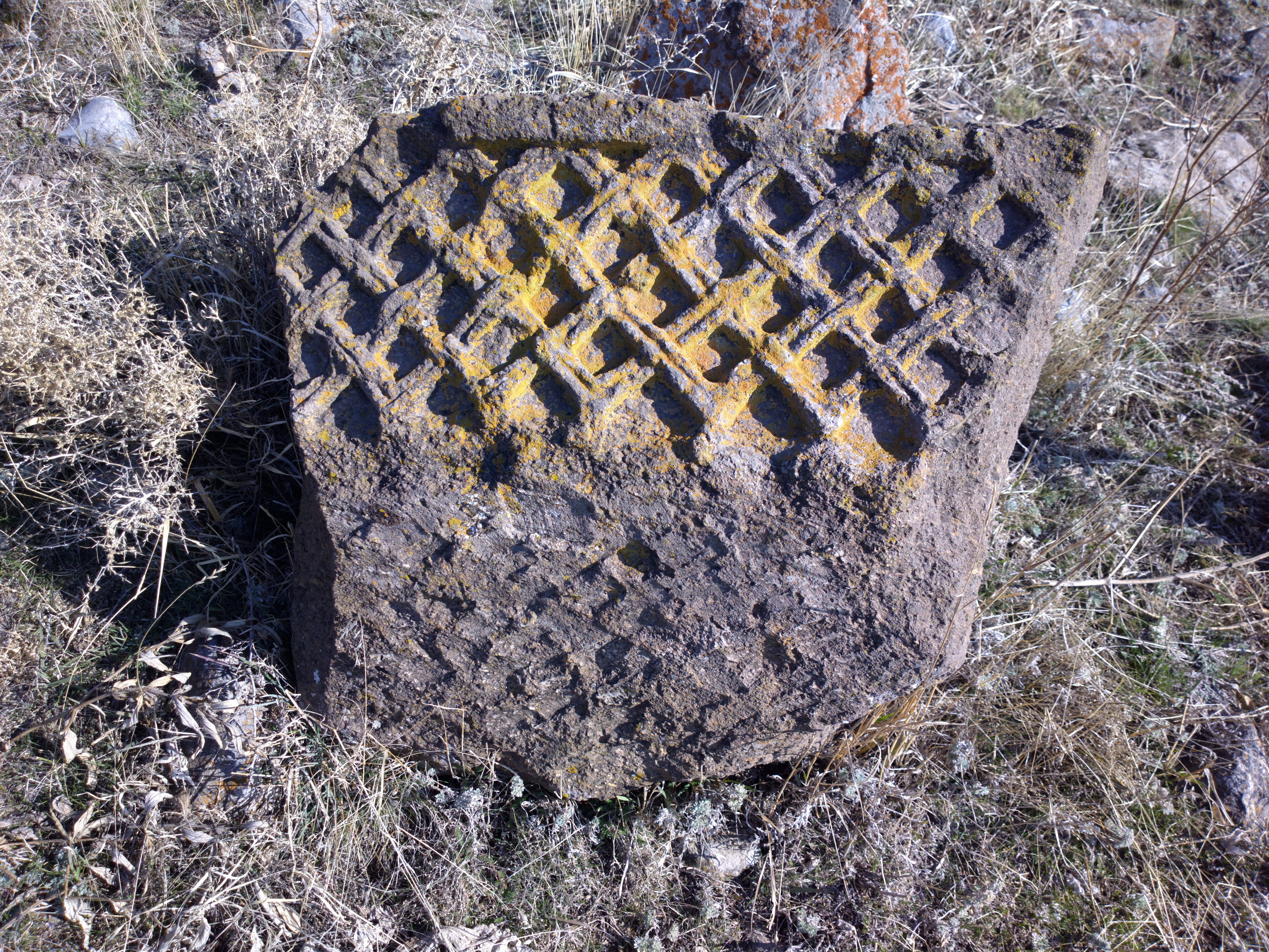 Եկեղեցի Զորավար (Սբ. Թեոդորոս, «Ղարղավանք») 31/2.1